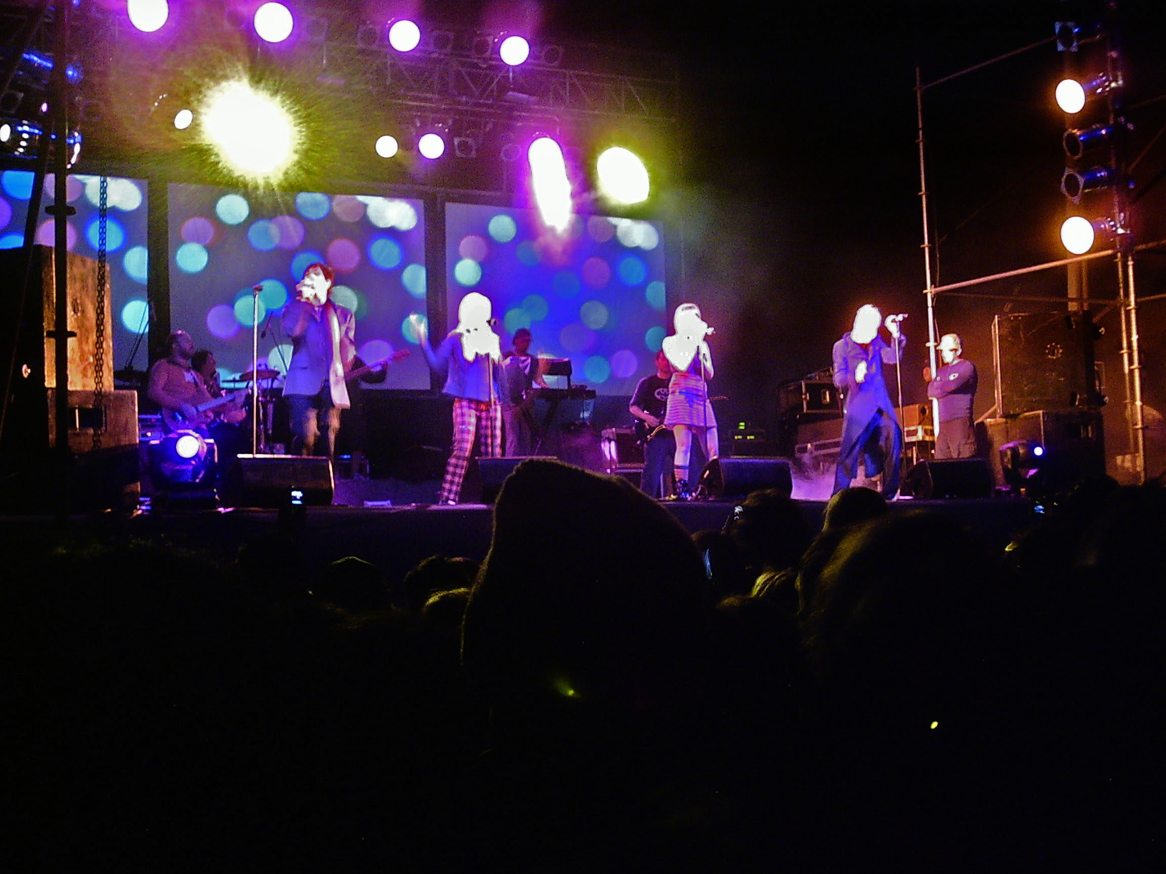 El grupo chileno Kudai presentándose durante la Semana Pichilemina, en Pichilemu, Chile, enero de 2007.